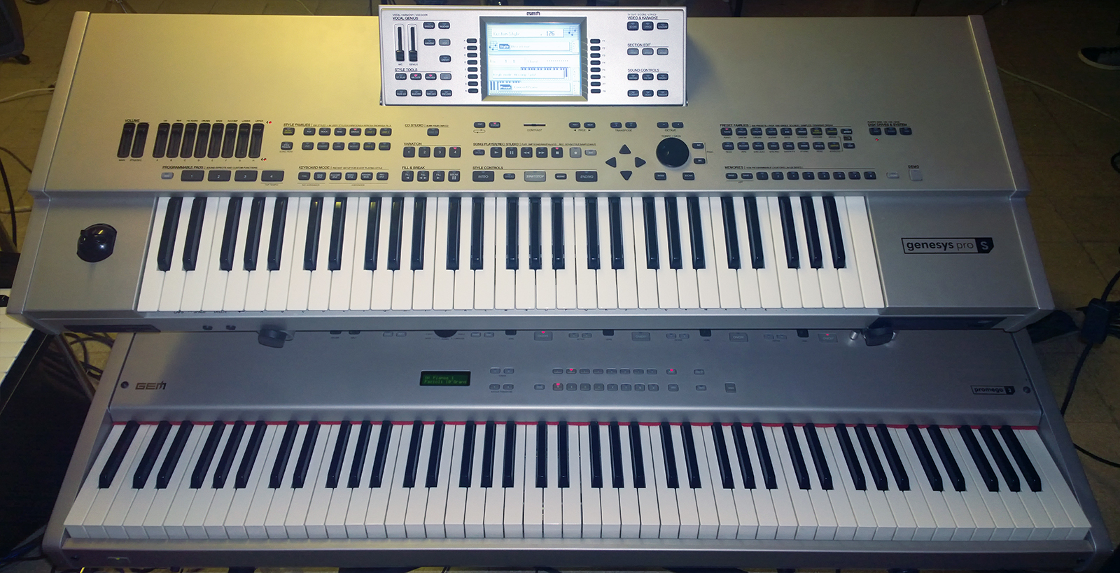 Una Gem Genesys ProS ed un Promega 2